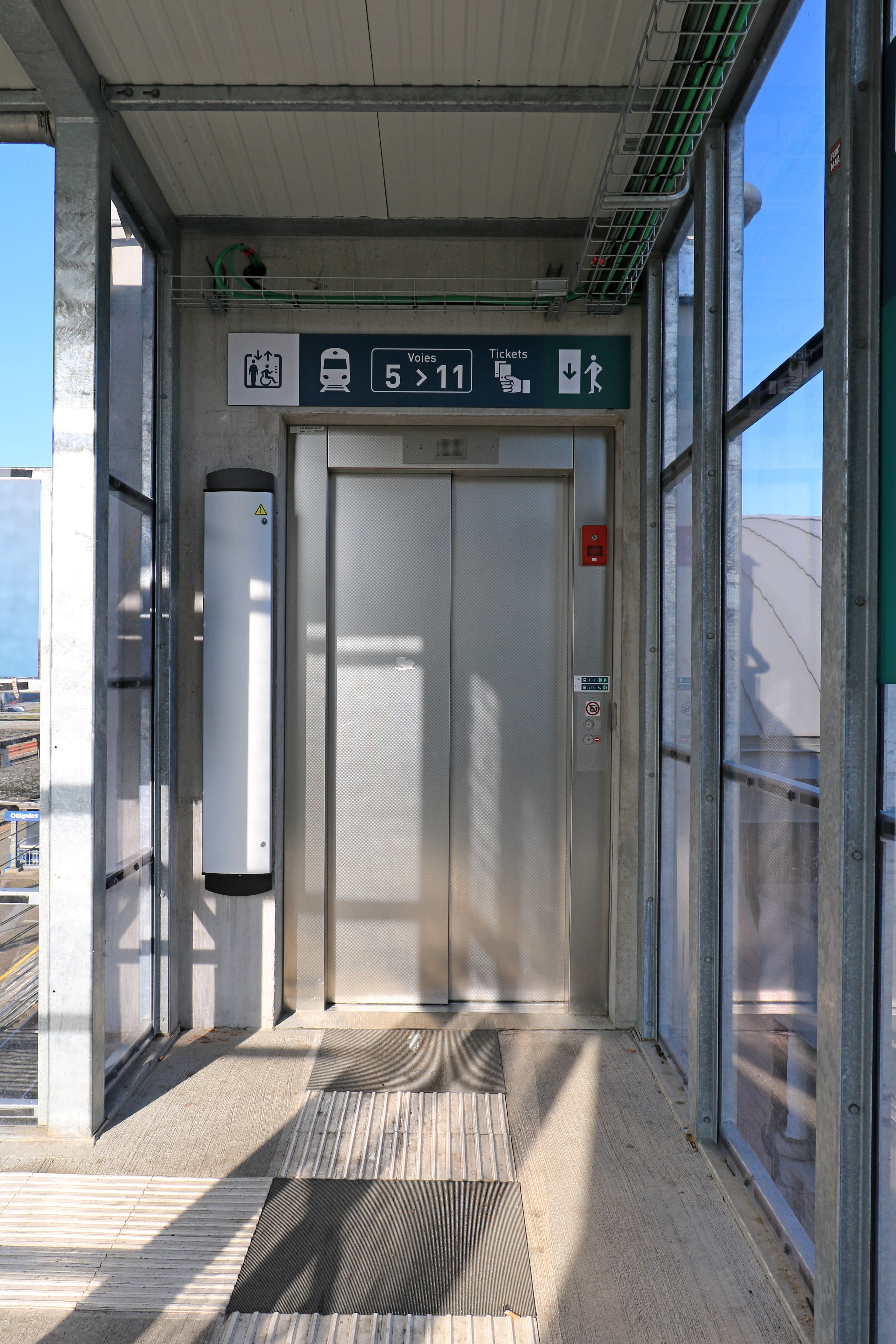 Belgique - Brabant wallon - Ottignies-Louvain-la-Neuve - Gare d'Ottignies - ascenseur de la nouvelle passerelle (2019)